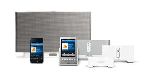 Všechny jednotky systému Sonos.